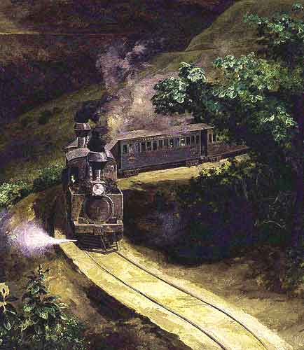 detail Mexico's Valley